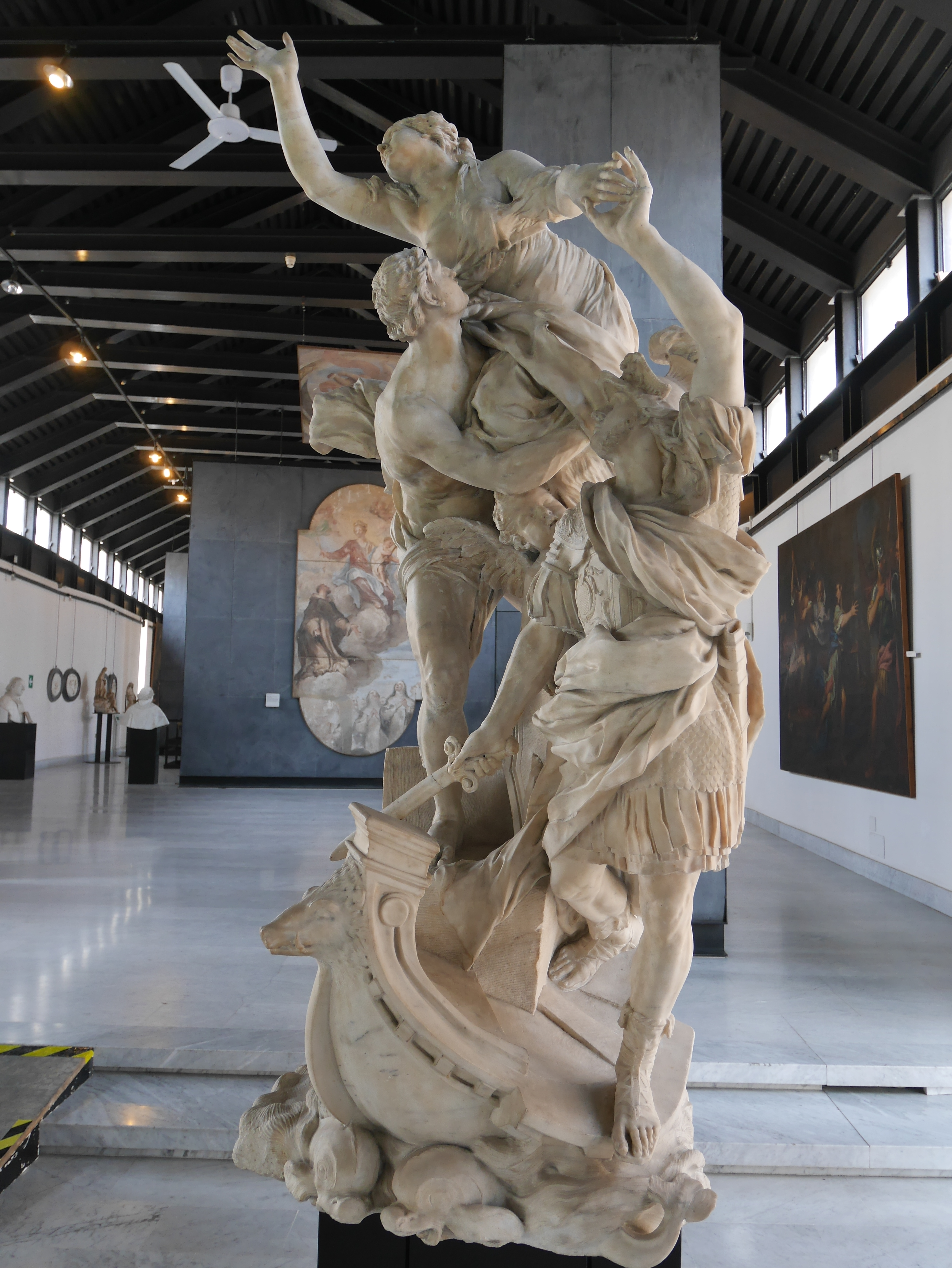 Museo di Sant'Agostino di Genova This is a photo of a monument which is part of cultural heritage of Italy.